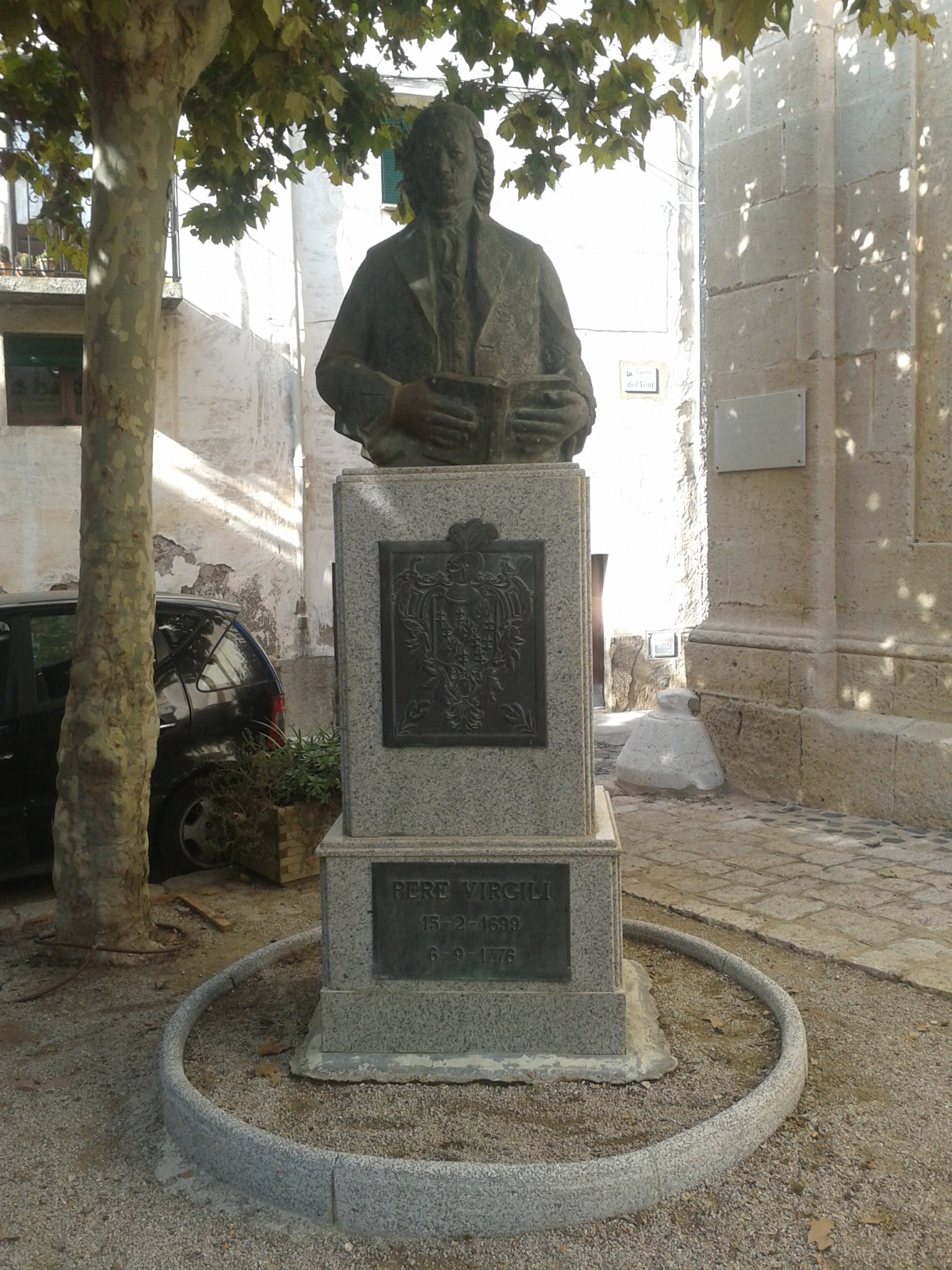 Monument al cirurgià Pere Virgili a la Plaça de l'Església de Vilallonga del Camp